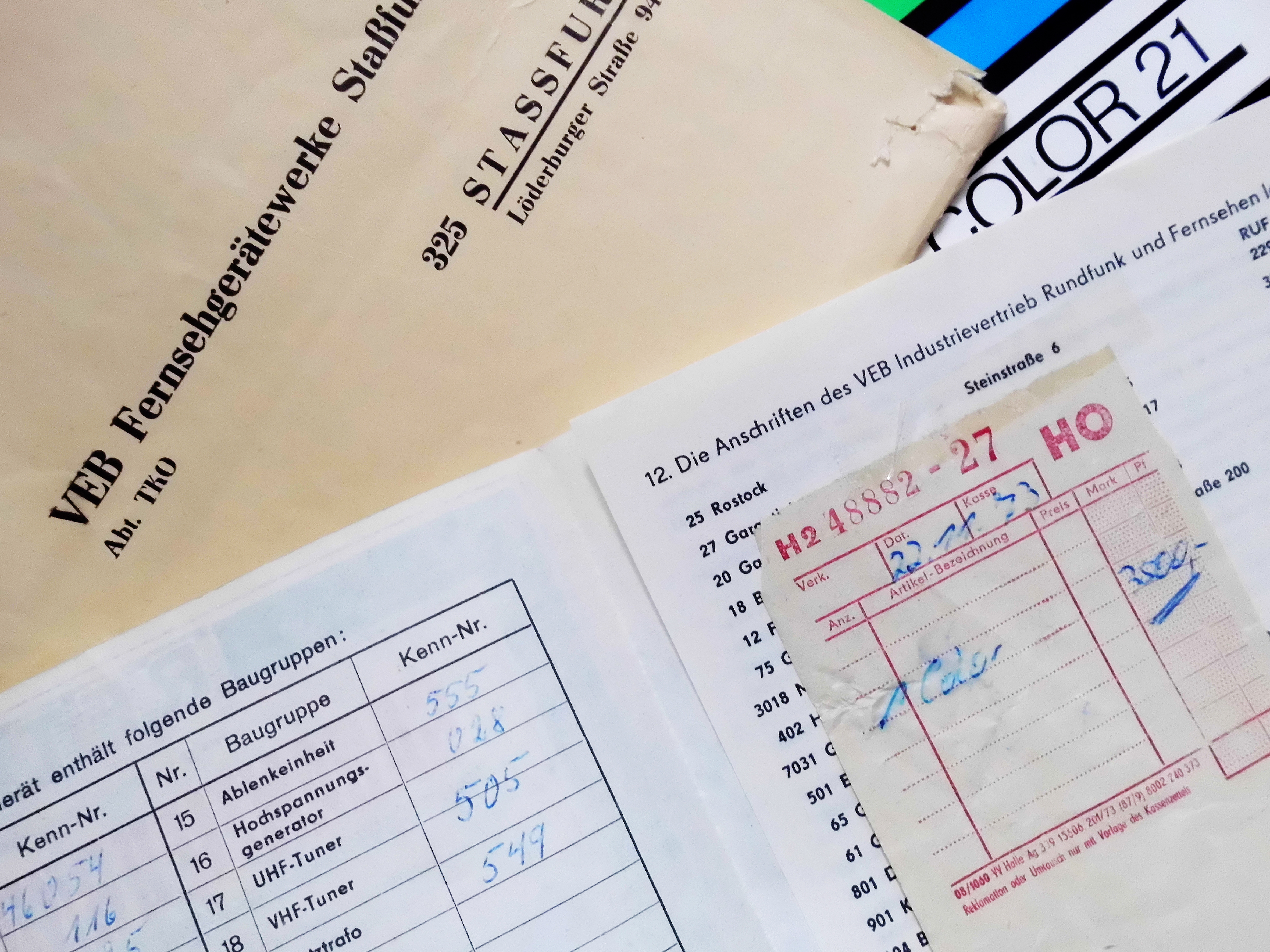 DDR_VEB Fernsehgerätewerke Straßfurt_Fernseher COLOR 21_HO Verkaufsbeleg_1973_über 3500 Mark